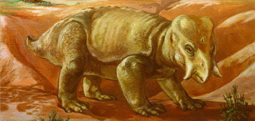 Afbeeldingbeschrijving: Placerias hesternus, een vertegenwoordiger van de Dicynodonta. Bron: Dinosaurs, Giant Reptiles, and Other Triassic Animals van Petrified Forest National Park, Arizona (USA)